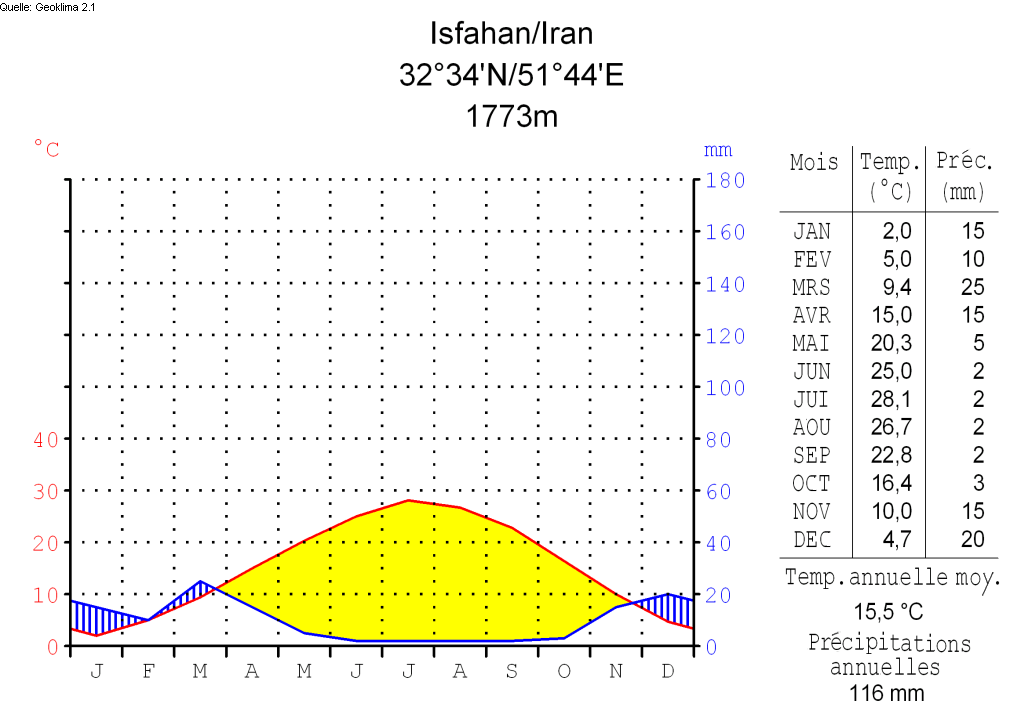 diagramme de climatiquepar Walter et Lieth, métrique, °Celsisus et millimètres, faits avec Geoklima 2.1